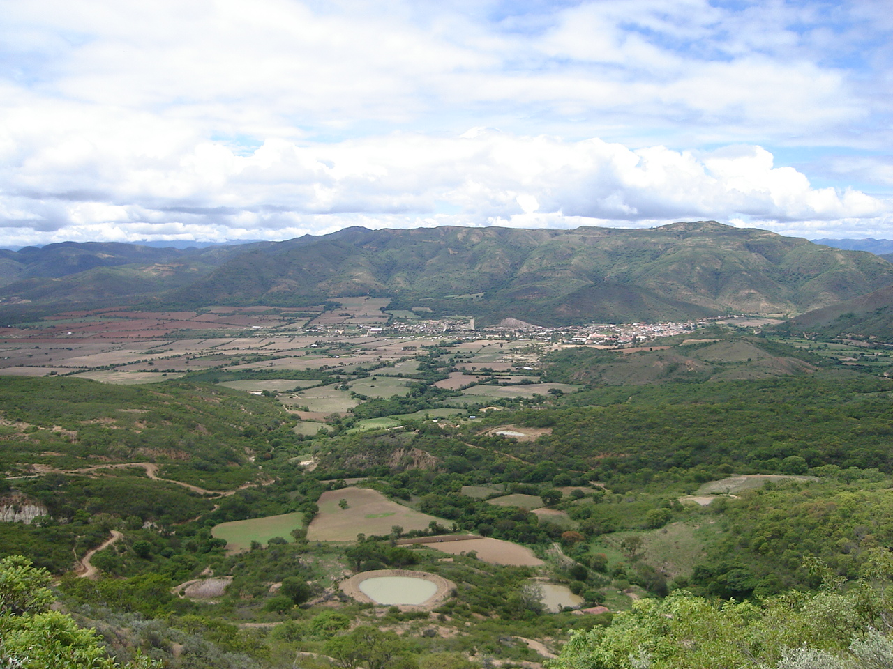 Vista Panoramica